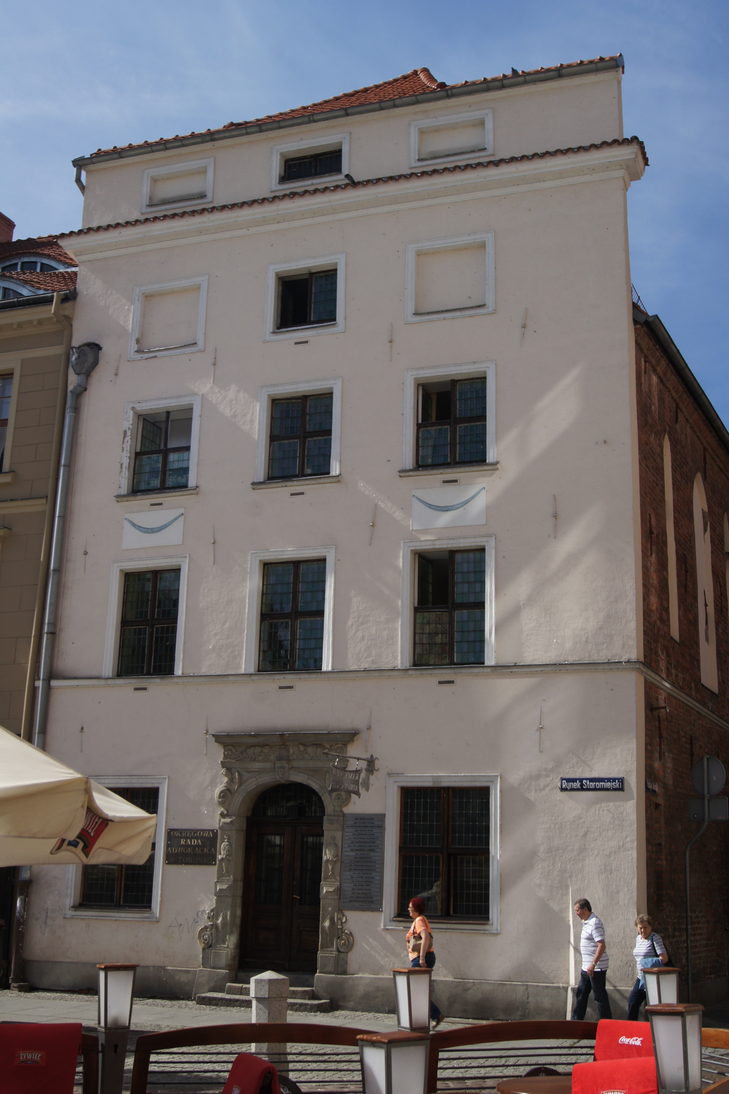 Toruń, Rynek Staromiejski 17 - dom, XV, 1703, XIX w. (zabytek nr A/77/210)